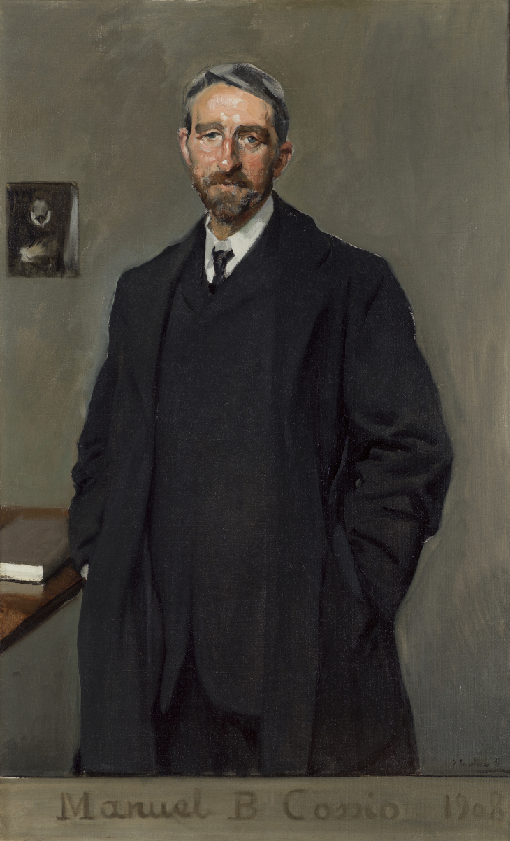 Retrato de Manuel Bartolomé Cossío (1857 - 1935).